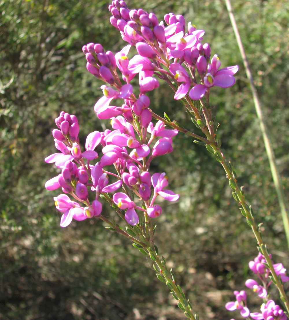 Comesperma ericinum Anglesea, Victoria, Australia